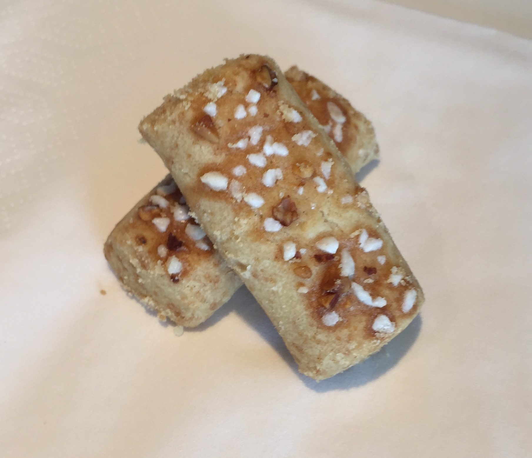 Två finska pinnar på en servett